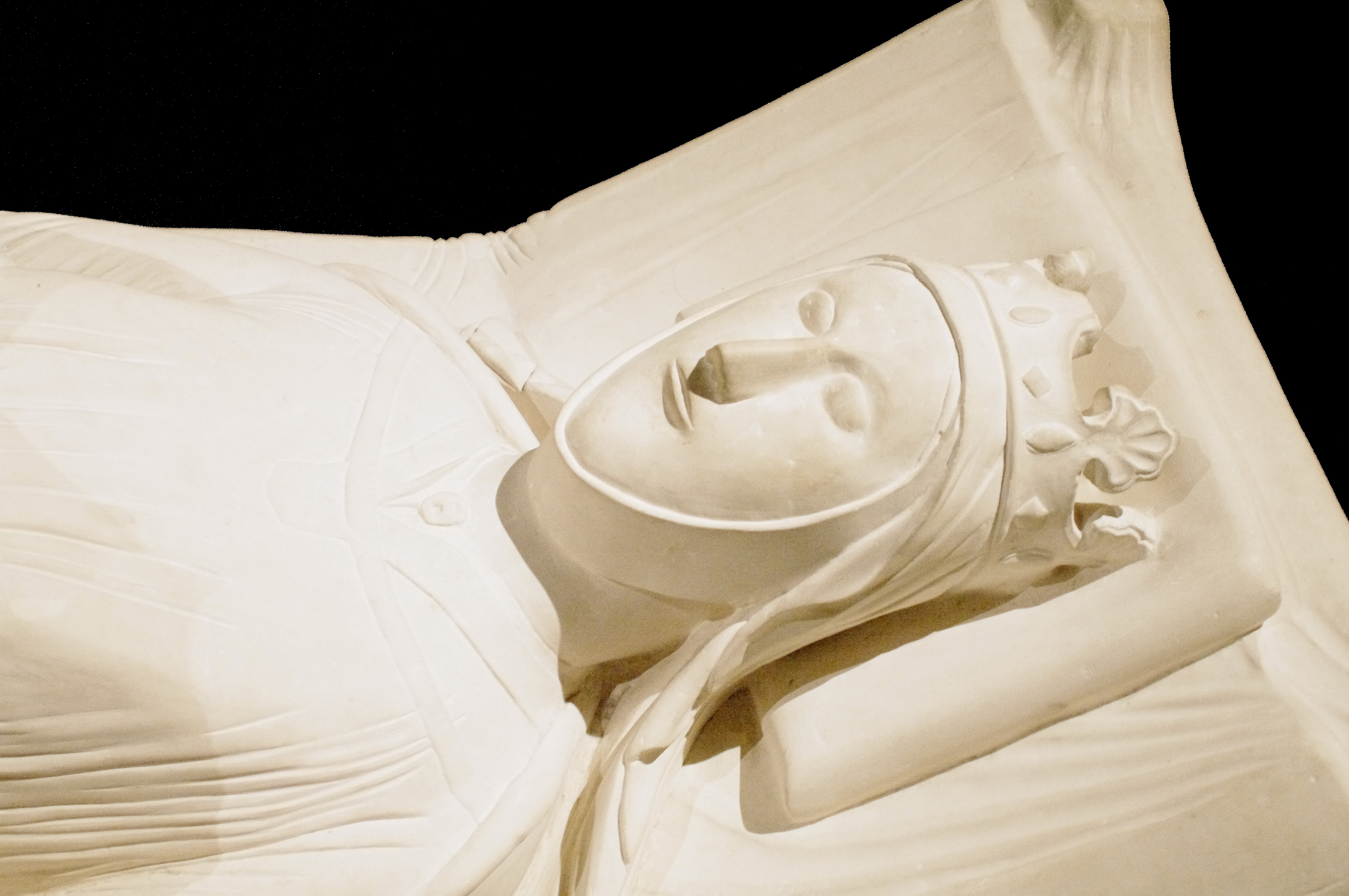 Exposé au musée d'Aquitaine